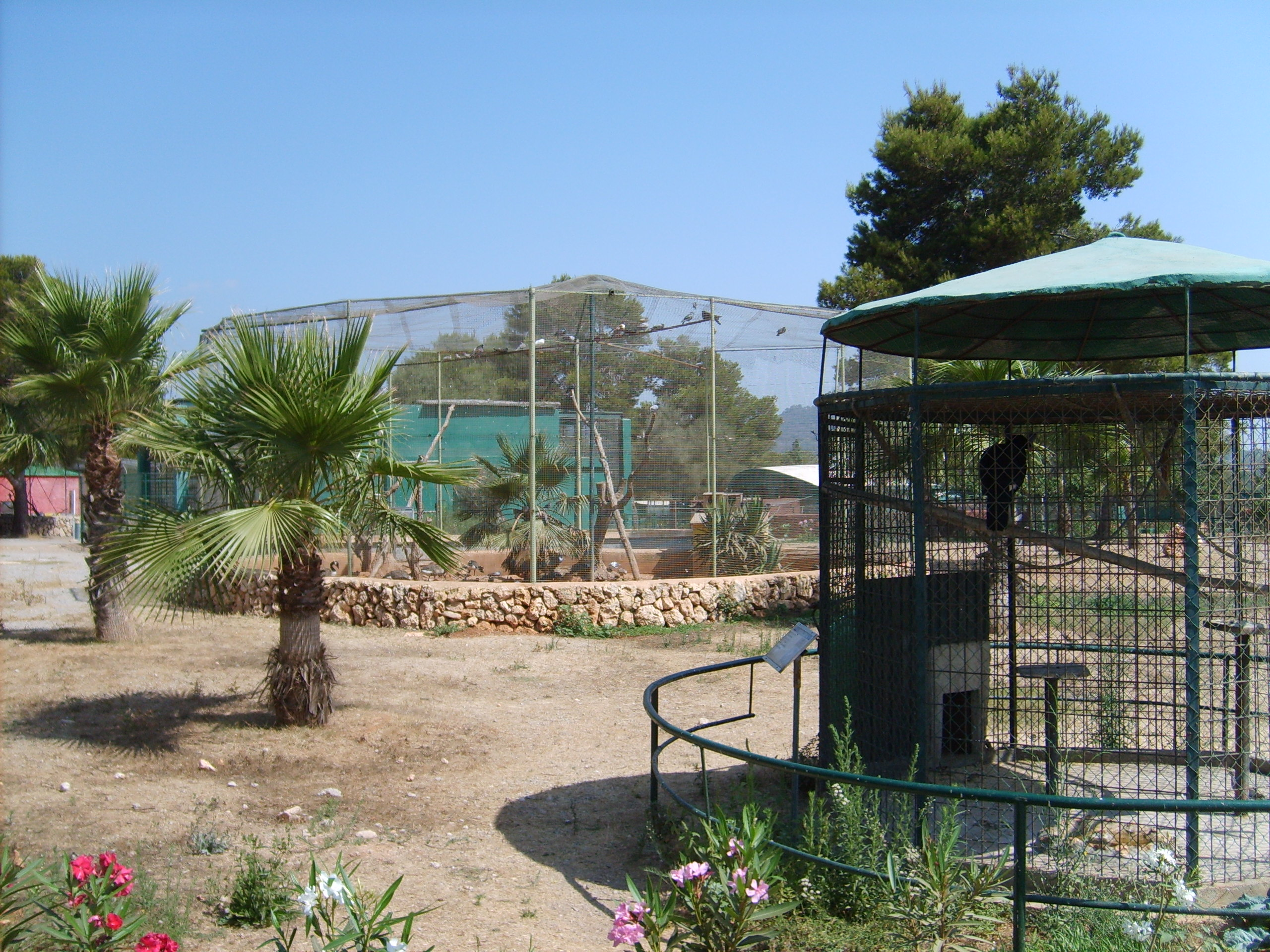 Safaripark Sa Coma auf Mallorca